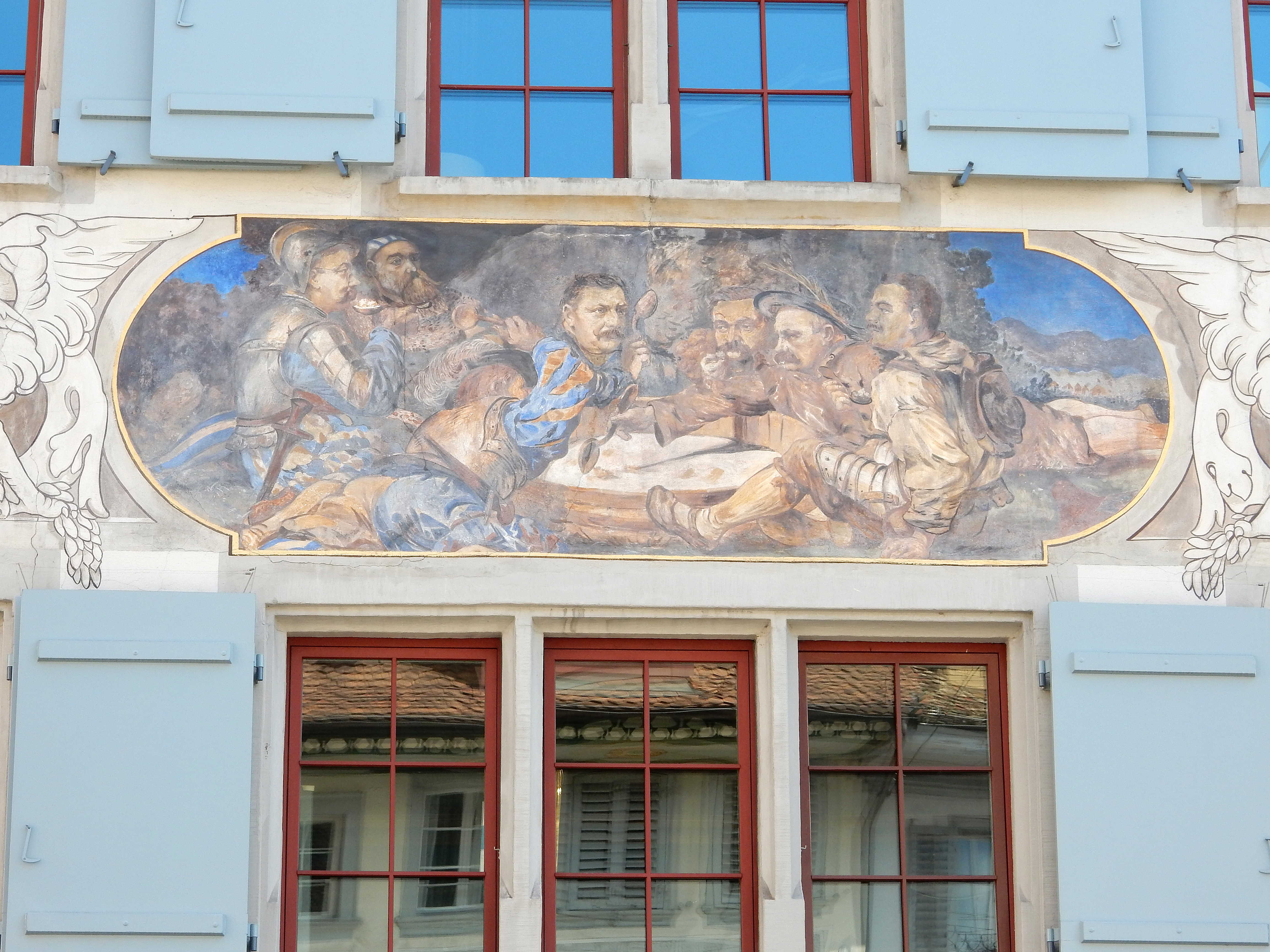 Zoug, Kolinplatz, Stadthaus (ancienne maison Bossard), soupe au lait de Kappel, peinte en 1910